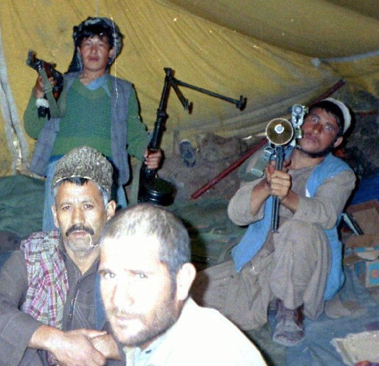 Jaji Paktia Afghanistan